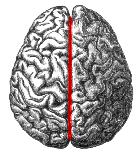 longitudinal fissure.